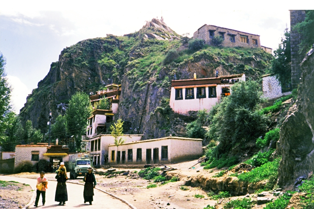 Below Chagpori, Lhasa